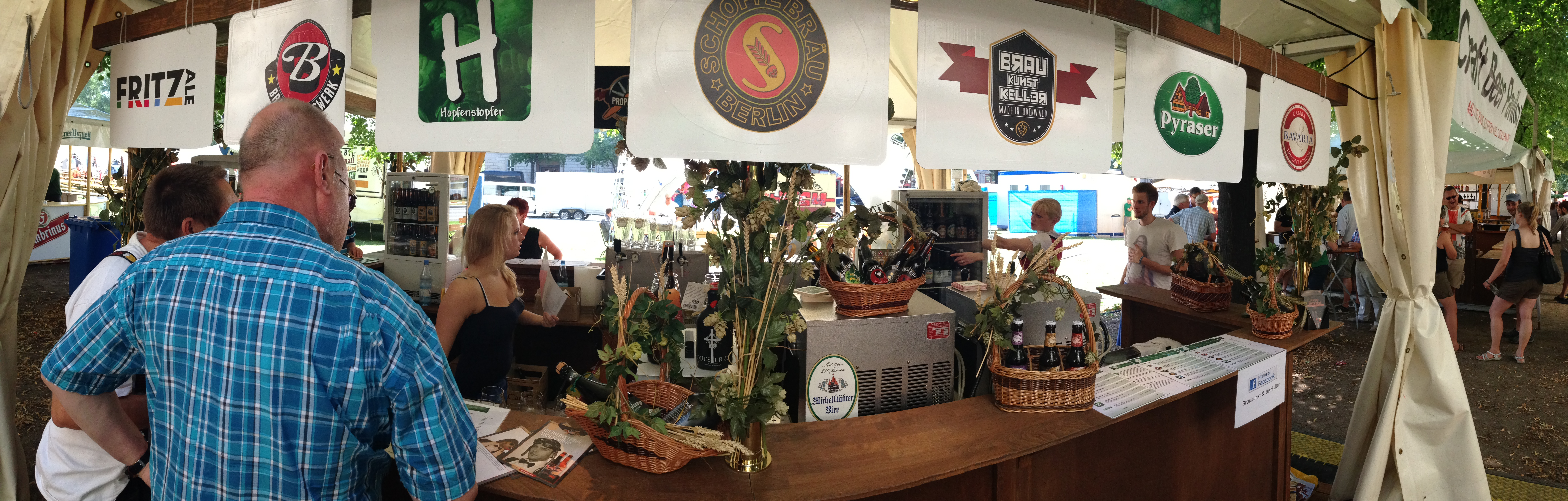 CraftBierStand auf der Biermeile in Berlin 2013